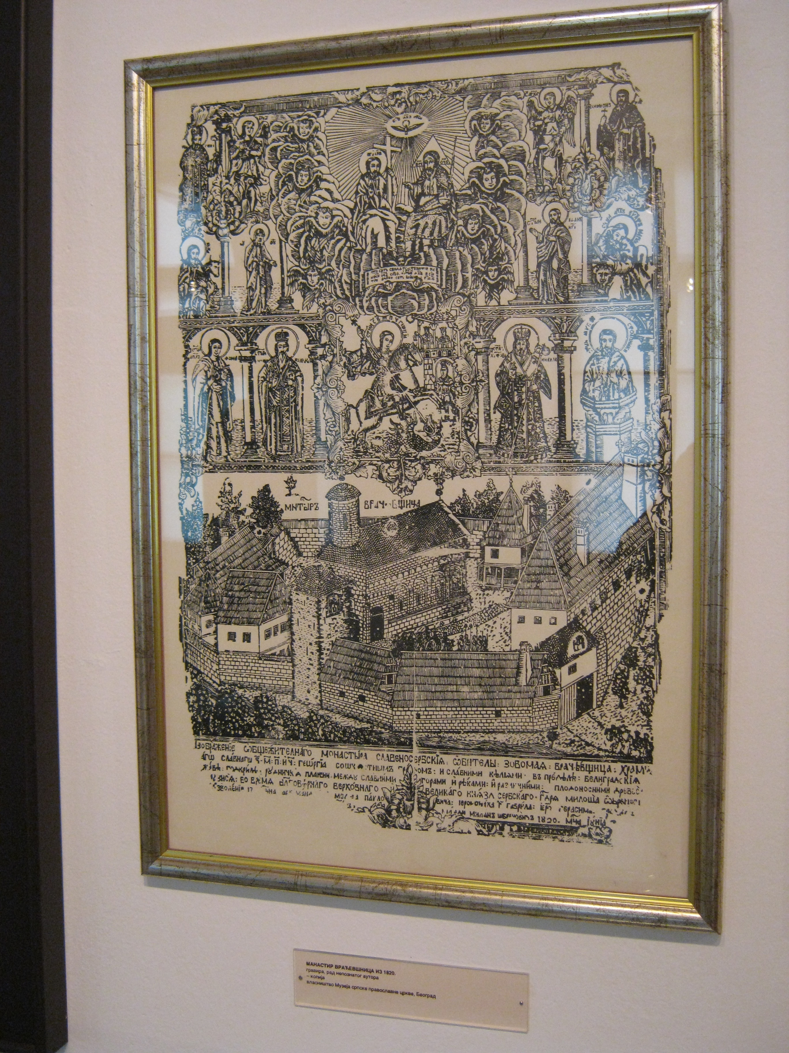 Музеј Другог српског устанка се налази у Такову и послује као део Музеја Рудничко-таковског краја. Музеј је смештен у згради старе таковске школе. У згради је смештена изложба предмета и докумената из Другог српског устанка.